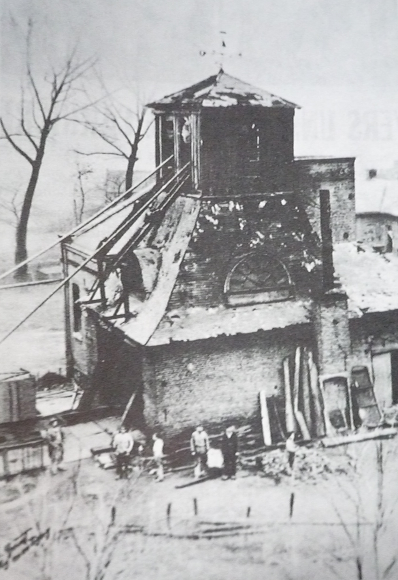 La Fosse n° 1 dite Fosse Poussière de la Compagnie des mines de Courrières était un charbonnage constitué d'un seul puits situé à Courrières, Pas-de-Calais, Nord-Pas-de-Calais, France.